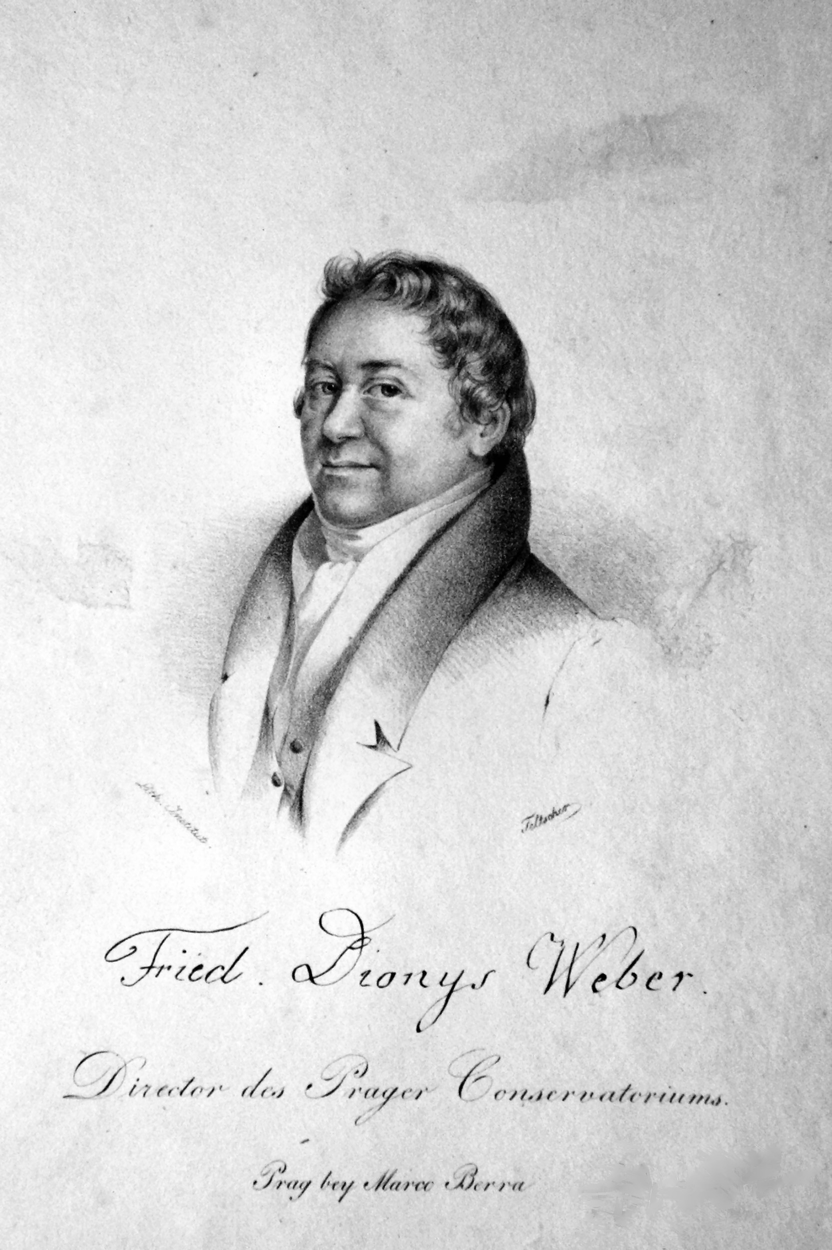 Friedrich Dionys Weber (1777-1842), Komponist, Direktor des Prager Konservatoriums. Lithographie von Josef Eduard Teltscher, um 1830